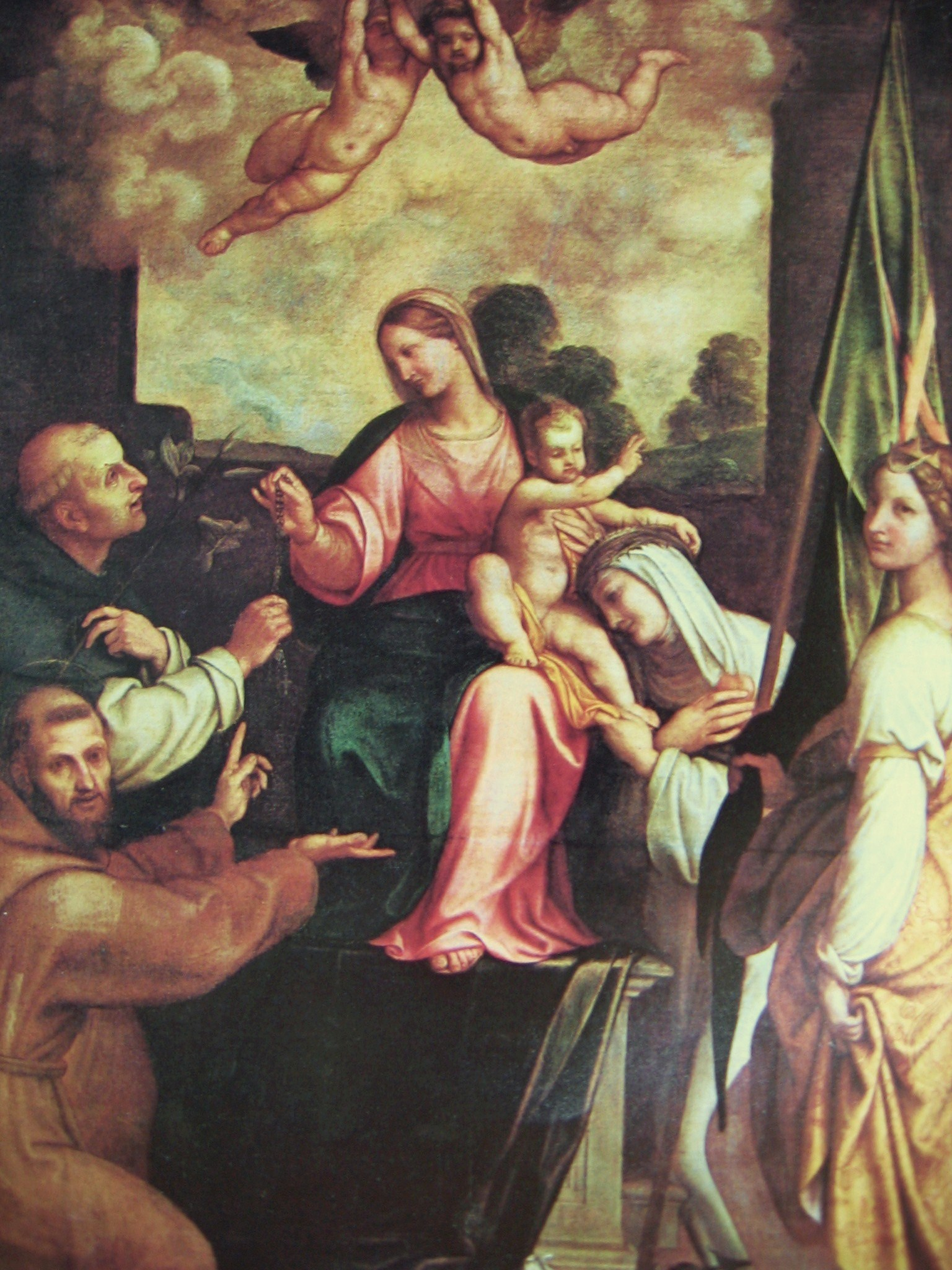 Enea Salmeggia, Vergine del Rosario, chiesa di San Giorgio, Fiorano al Serio, Bergamo, Italy